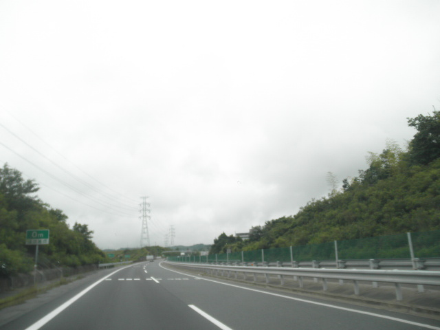 兵庫県神戸市西区見津が丘1丁目 山陽自動車道木見支線